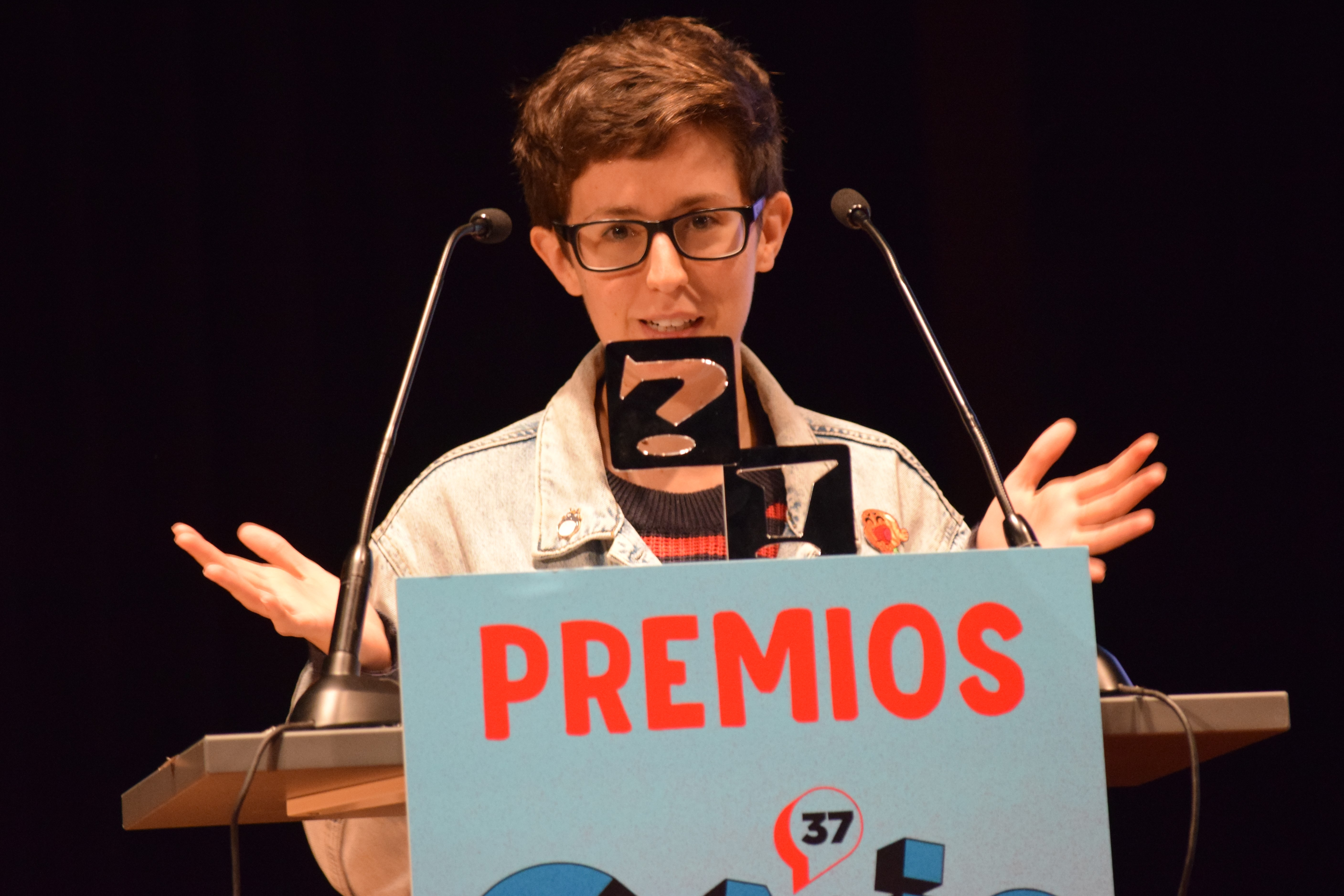 Lourdes Navarro pronunciat un discurs durant la cerimònia d'entrega dels premis del Saló. Lourdes Navarro fou guardonada en la nova categoria de Millor Obra Infantil / Juvenil per l'obra El árbol que crecía en mi pared (Sallybooks). 37. Comic Barcelona, 2019.